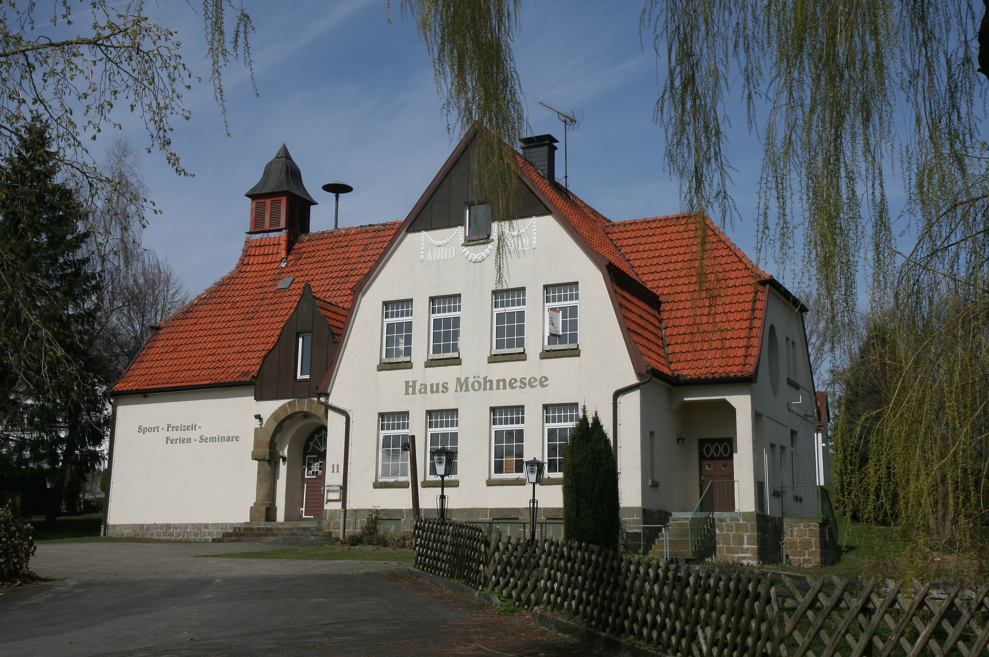 Alte Schule Delecke („Haus Möhnesee”) in Möhnesee-Delecke, Linkstraße 11.